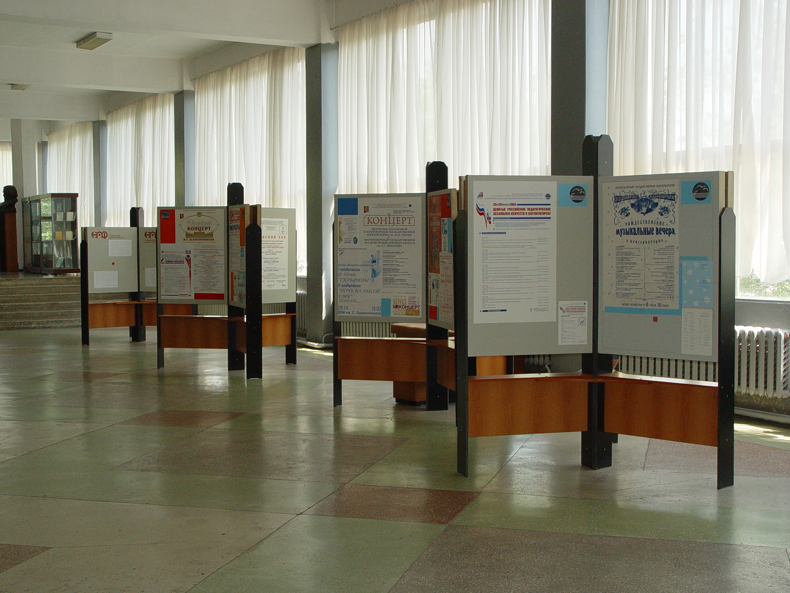 Некоторые стенды Музея музыкальной культуры г. Магнитогорска